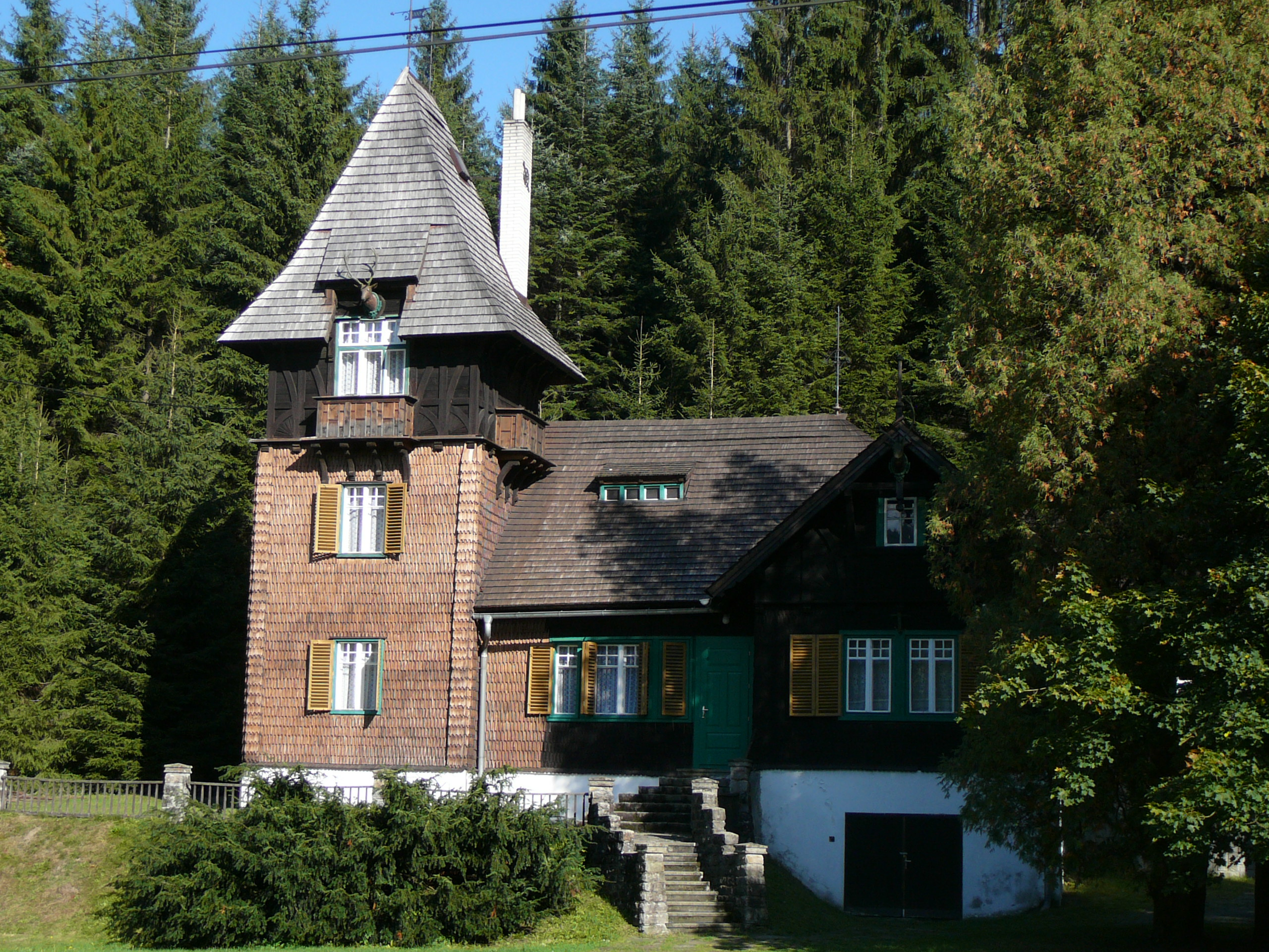 Lovecký (původně biskupský) zámeček, Bílá